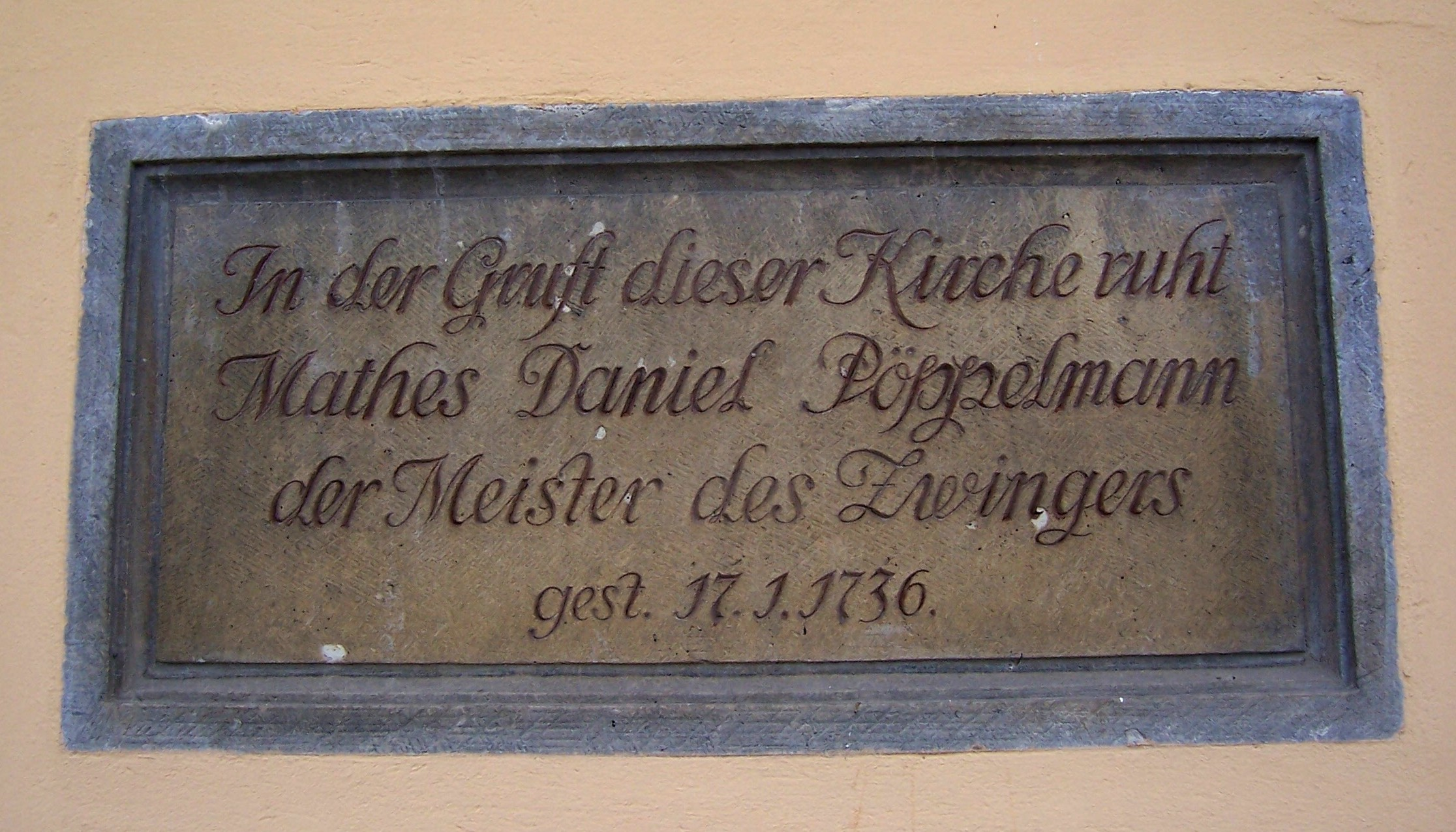 Platte an der Matthäuskirche, Dresden, die auf Matthäus Daniel Pöppelmanns Grab in der Gruft der Matthäuskirche verweist.